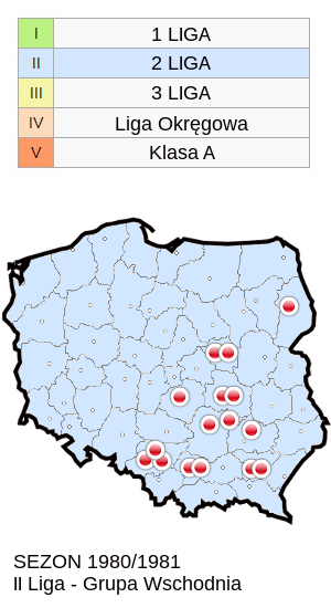 Jagiellonia w sezonie 1980/81 - mapa